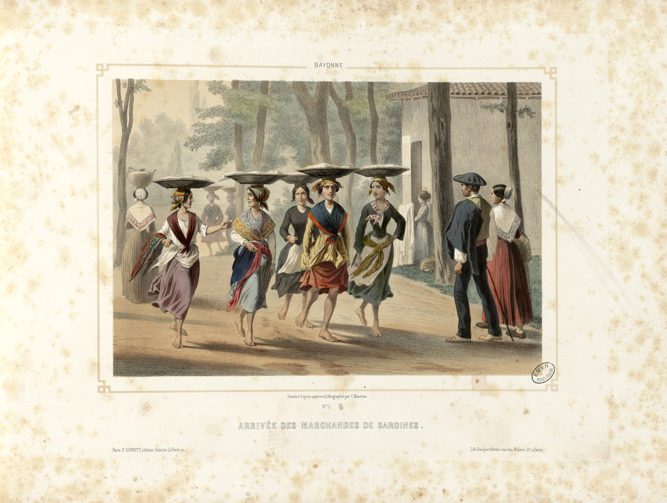 Titre calligraphié et illustré à l'encre sur feuille de calque Fait partie de deux albums réunis et publiés par F. Sinnett à Paris. Lith. de Becquet frères à Paris. Les planches du premier album ont été dessinées par Montaut et lithographiées par Bargue. Les planches du second album ont été dessinées et lithographiées par Charles Maurice. Le titre du premier album est lithographié. Le premier album est signalé dans la bibliographie pyrénéiste de Jacques Labarère comme étant très rare. Pièce jointe : photocopie en n. et b. d'une lithographie de Montaut intitulée "[Col de Tortes - Traversée de la montagne]". Ancely, René (1876 - 1966). Possesseur